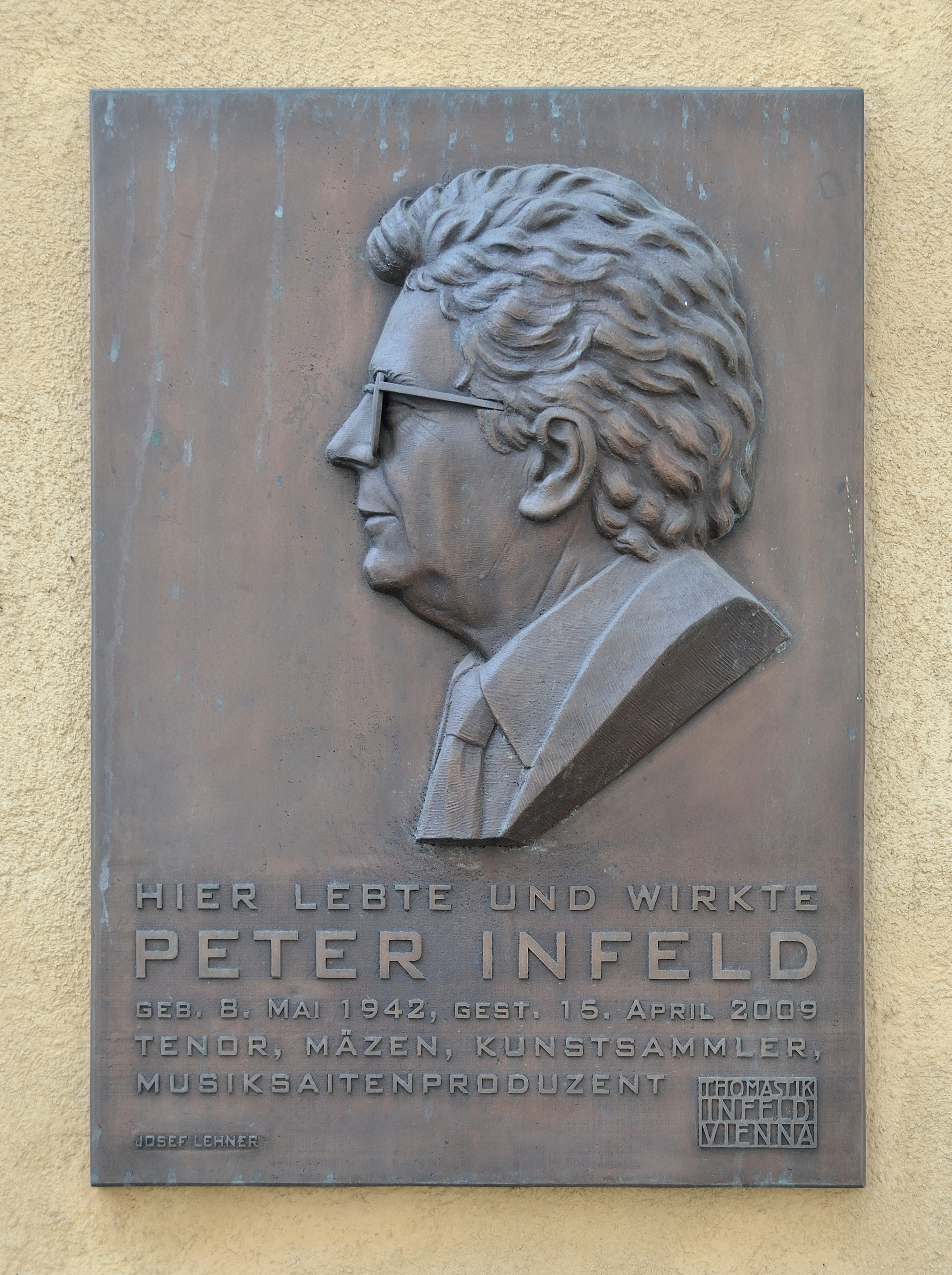 Gedenktafel für Peter Infeld in der Diehlgasse in Wien-Margareten. Infeld war Geschäftsführer der Thomastik-Infeld GmbH. Die Gedenktafel ist mit Josef Lehner signiert.